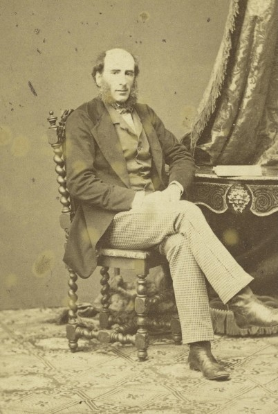 Eugen Kinský z Vchynic a Tetova (1818 - 1885), Rakouský šlechtic a politik.